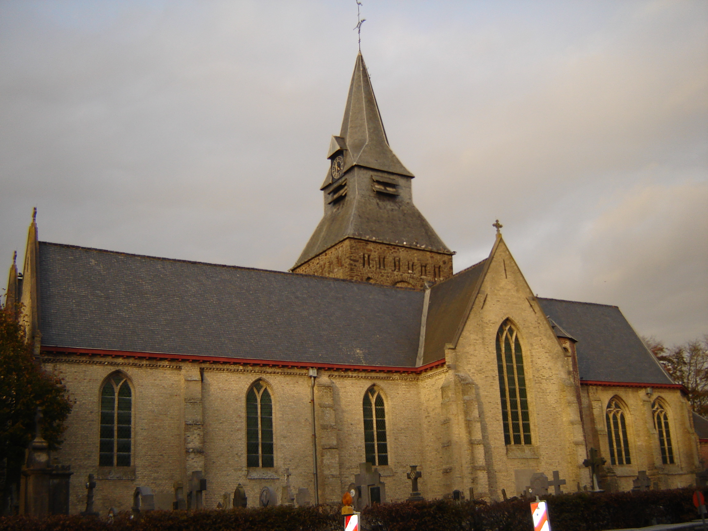 Sint-Martinuskerk in Haringe. Saint Martinus Church in Haringe in Roesbrugge-Haringe, Poperinge, West-Flanders, Belgium